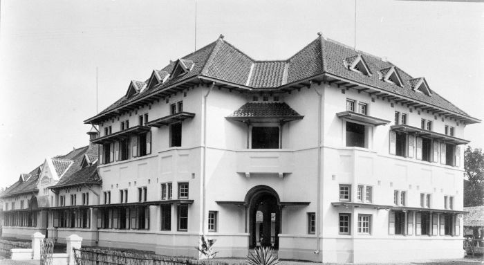 Foto. Pembangunan "Kartinischool" (Sekolah Kartini), dibuka pada 22 Juli 1918 di Bogor.